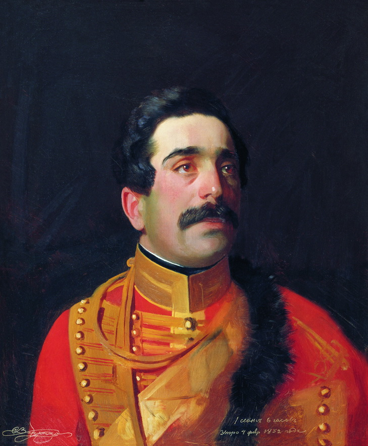 Портрет князя Семена Давыдовича Абамелека 1852